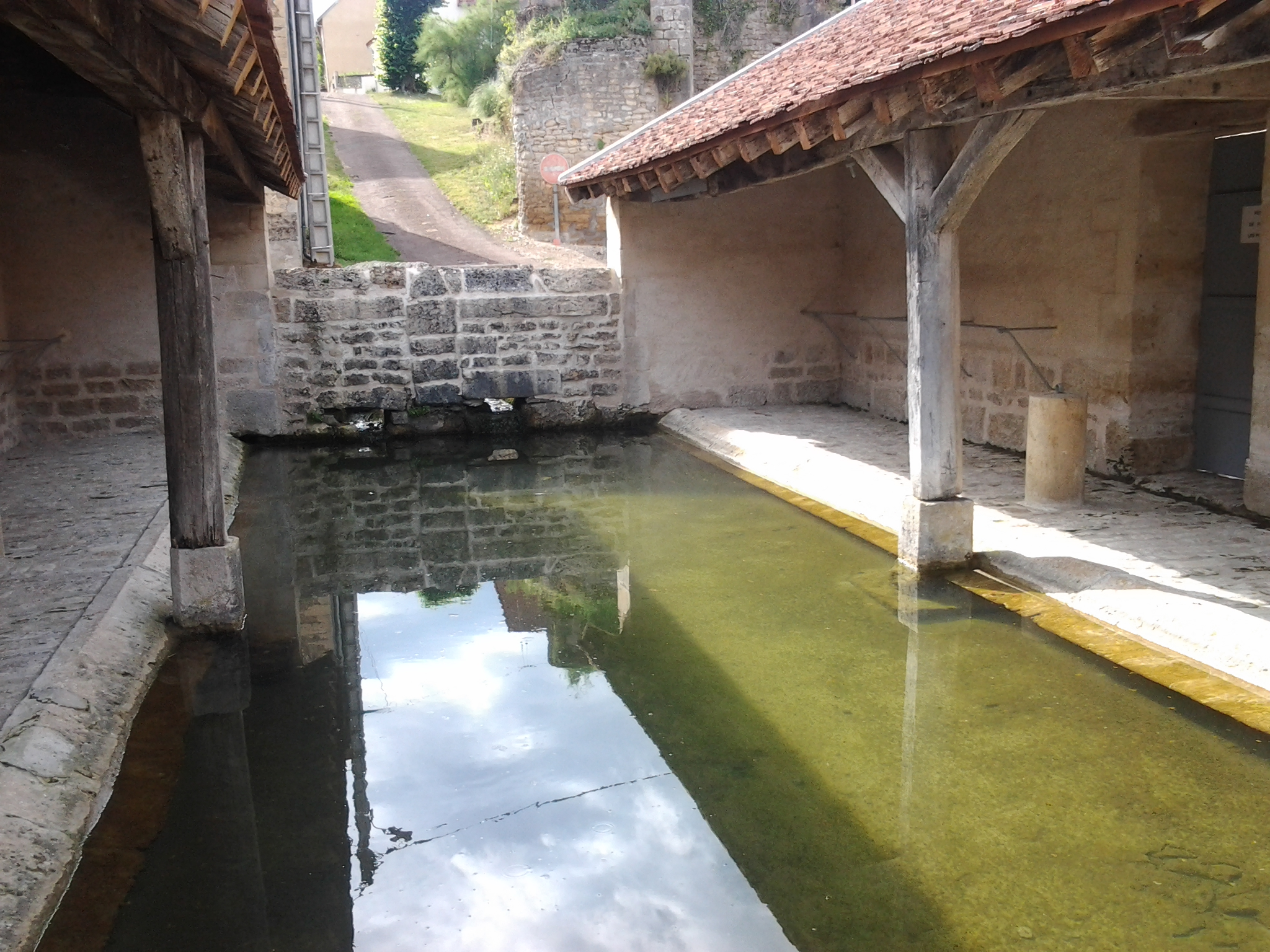 La fontaine et le lavoir d'Asnan en 2013.